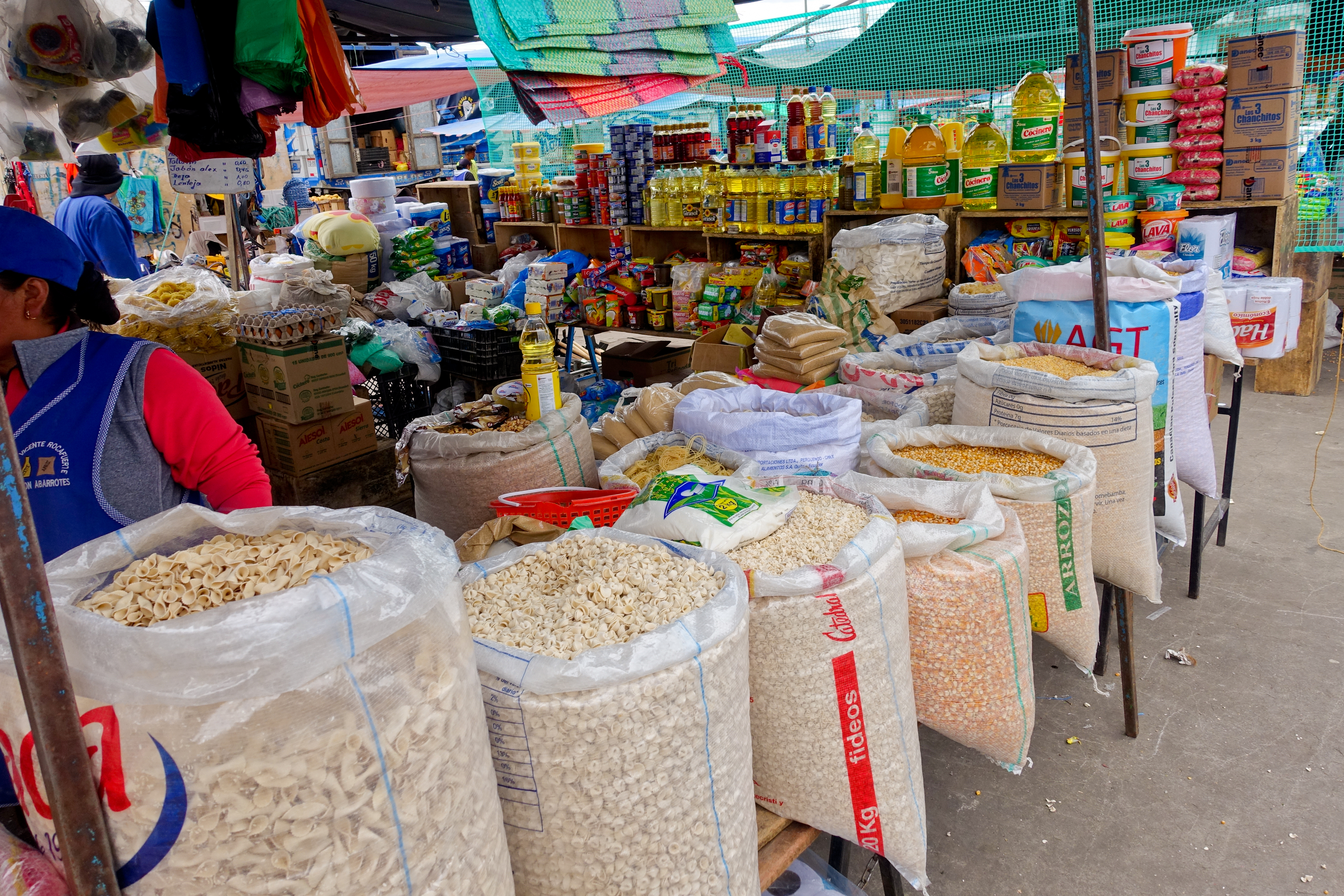 Indigener Markt mit Feldfrüchten aller Art in Saquisilí, Ecuador